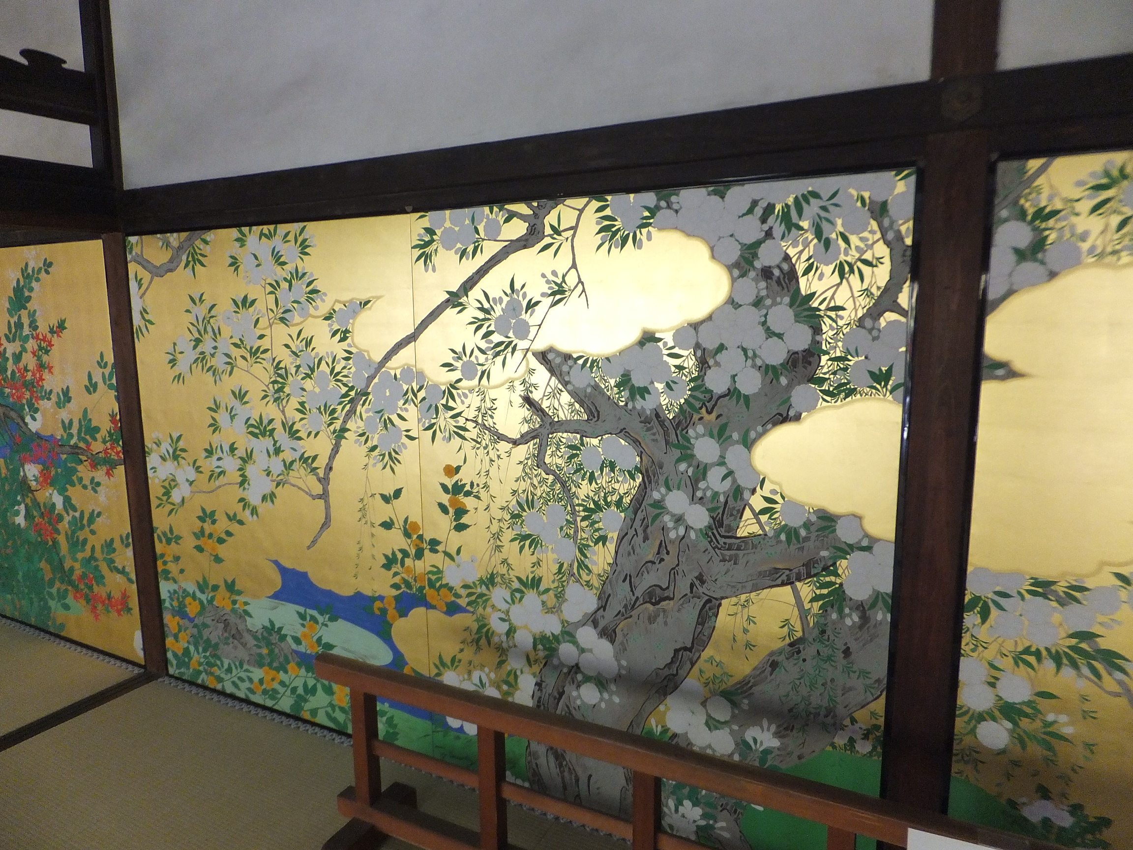 智積院(2013年5月3日)